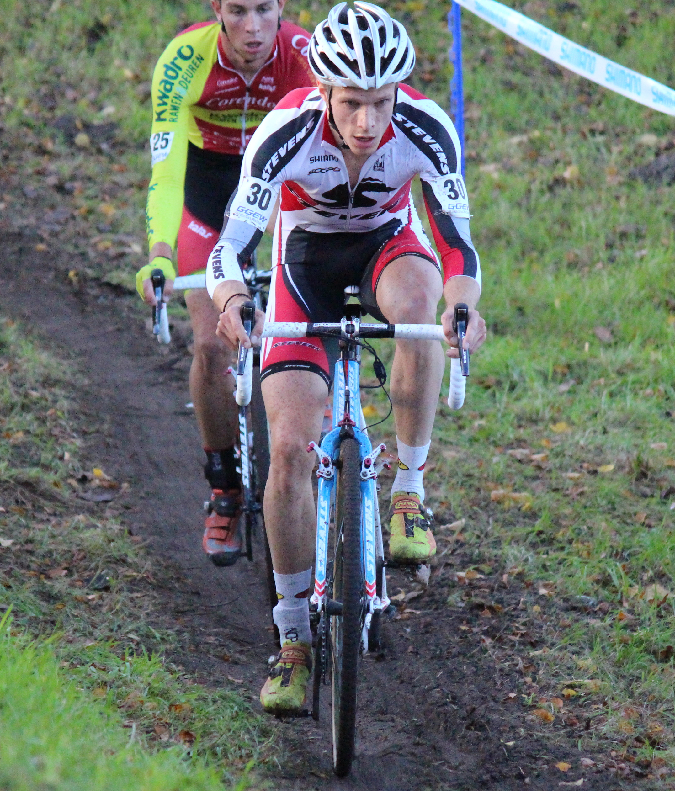 Ole Quast